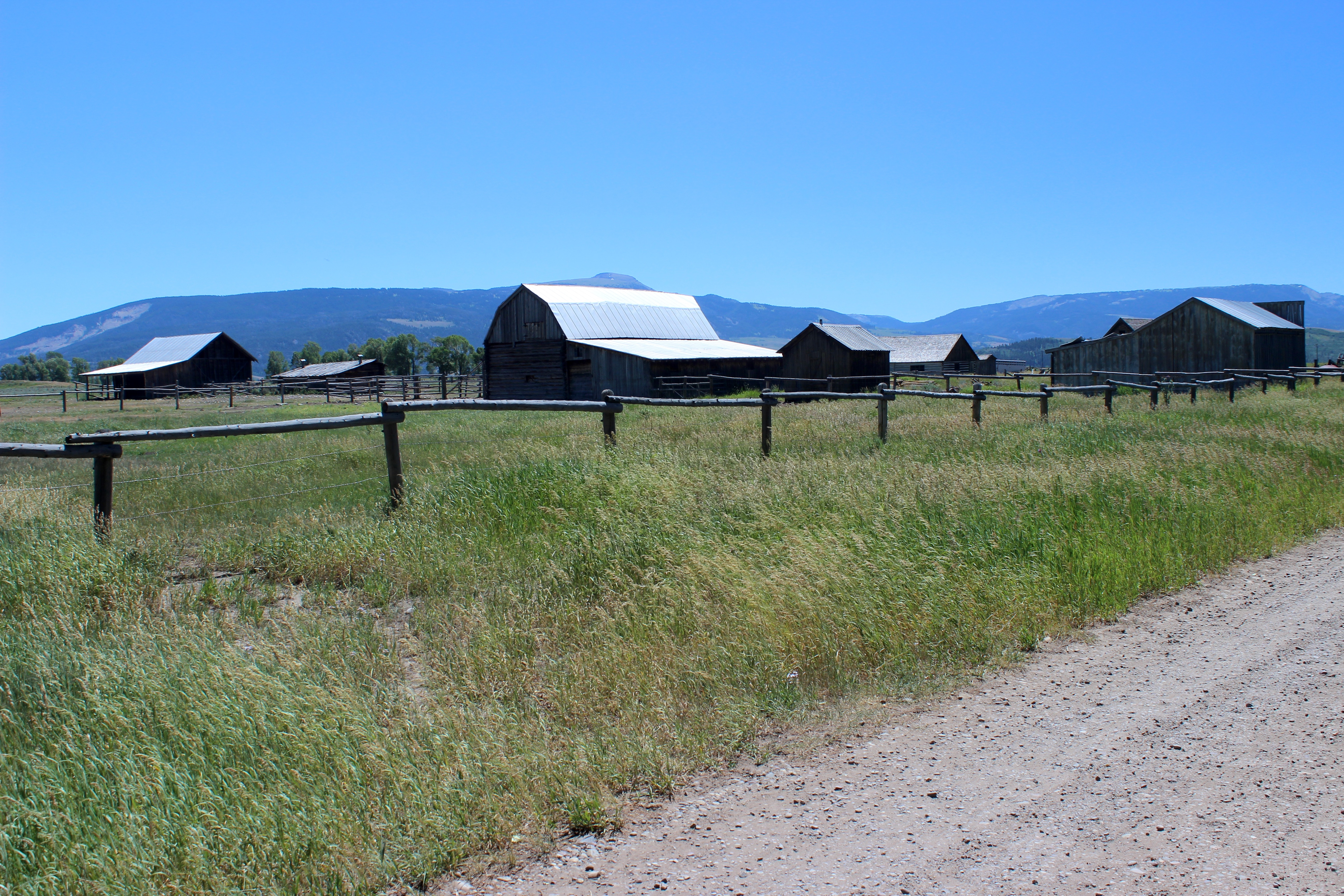 Grand Teton. Mormon Row.